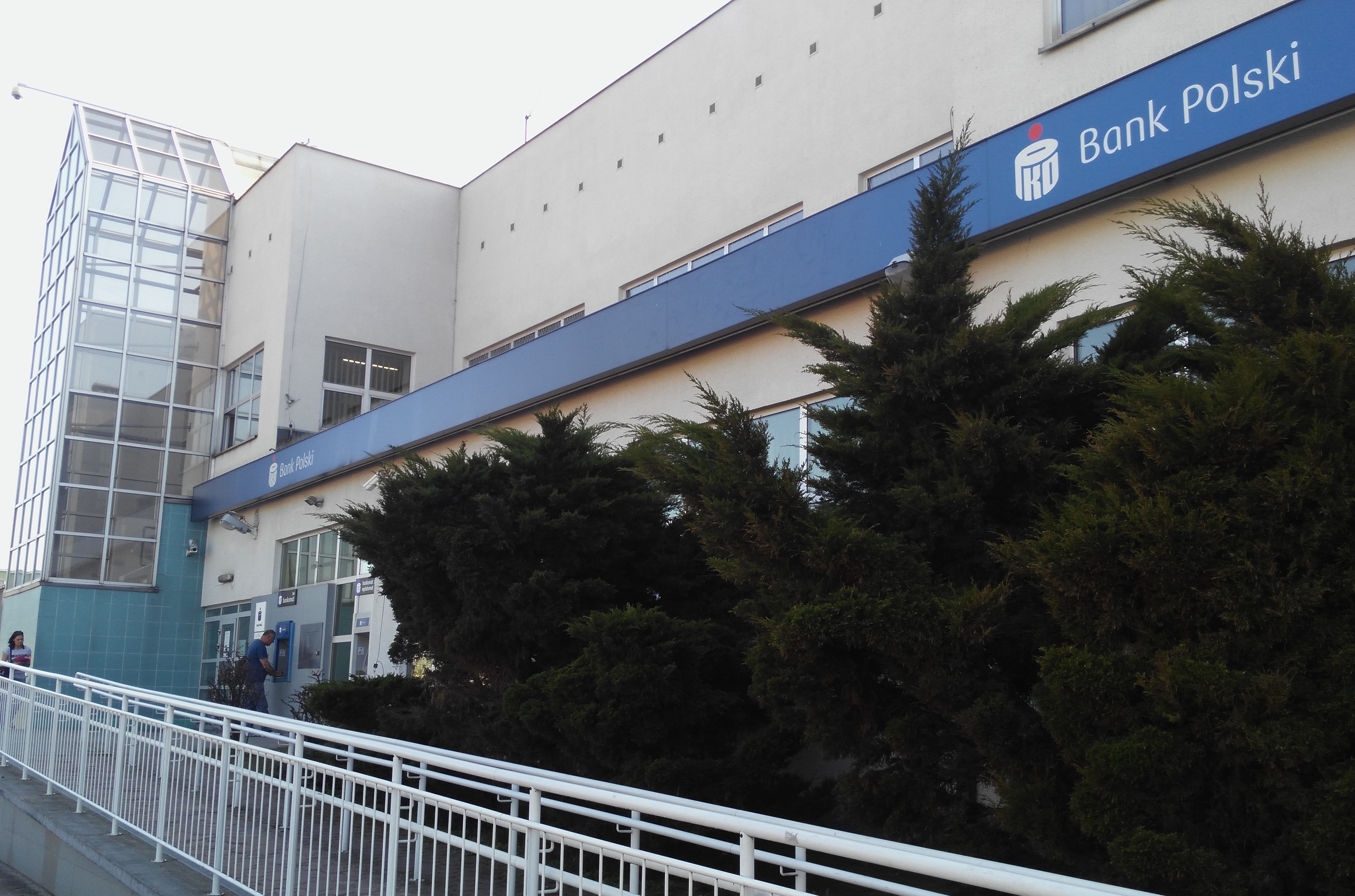 Siedziba PKO BP przy Granicznej w Tomaszowie Mazowieckim; na szczycie atrium jedna z kamer monitoringu miejskiego obserwująca ruchliwe rondo im. Tomaszowskich Olimpijczyków